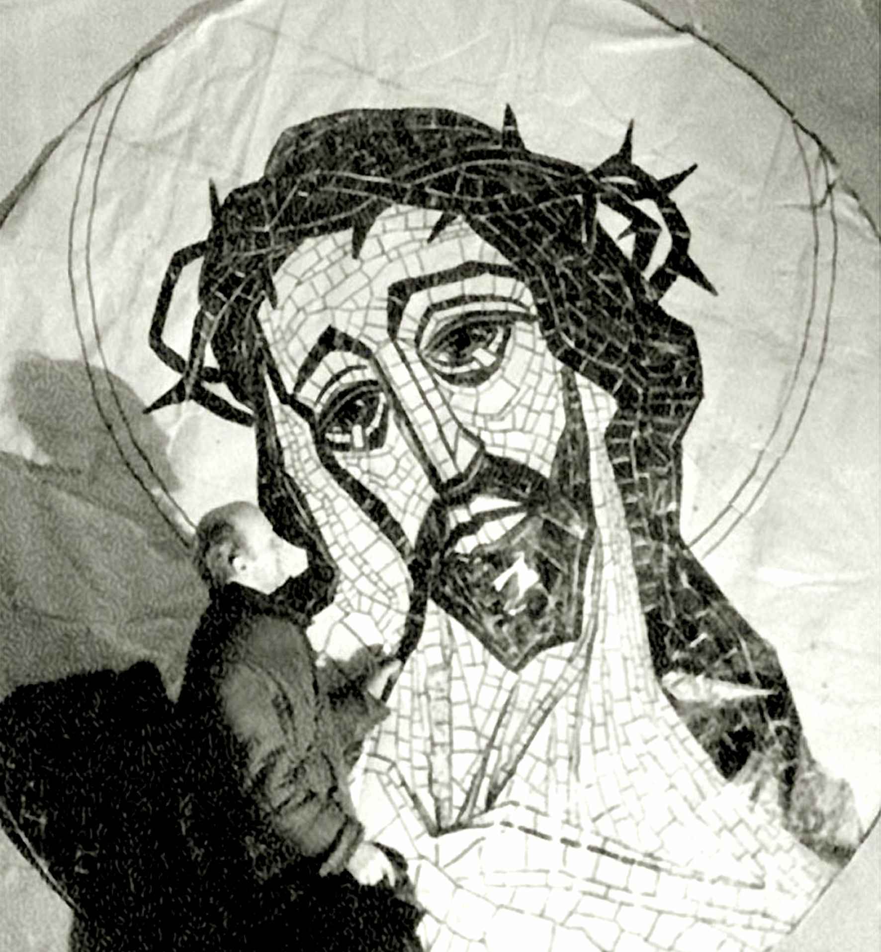 A Matuliauskas vyresnysis mozaikos Rupintojelis 1958